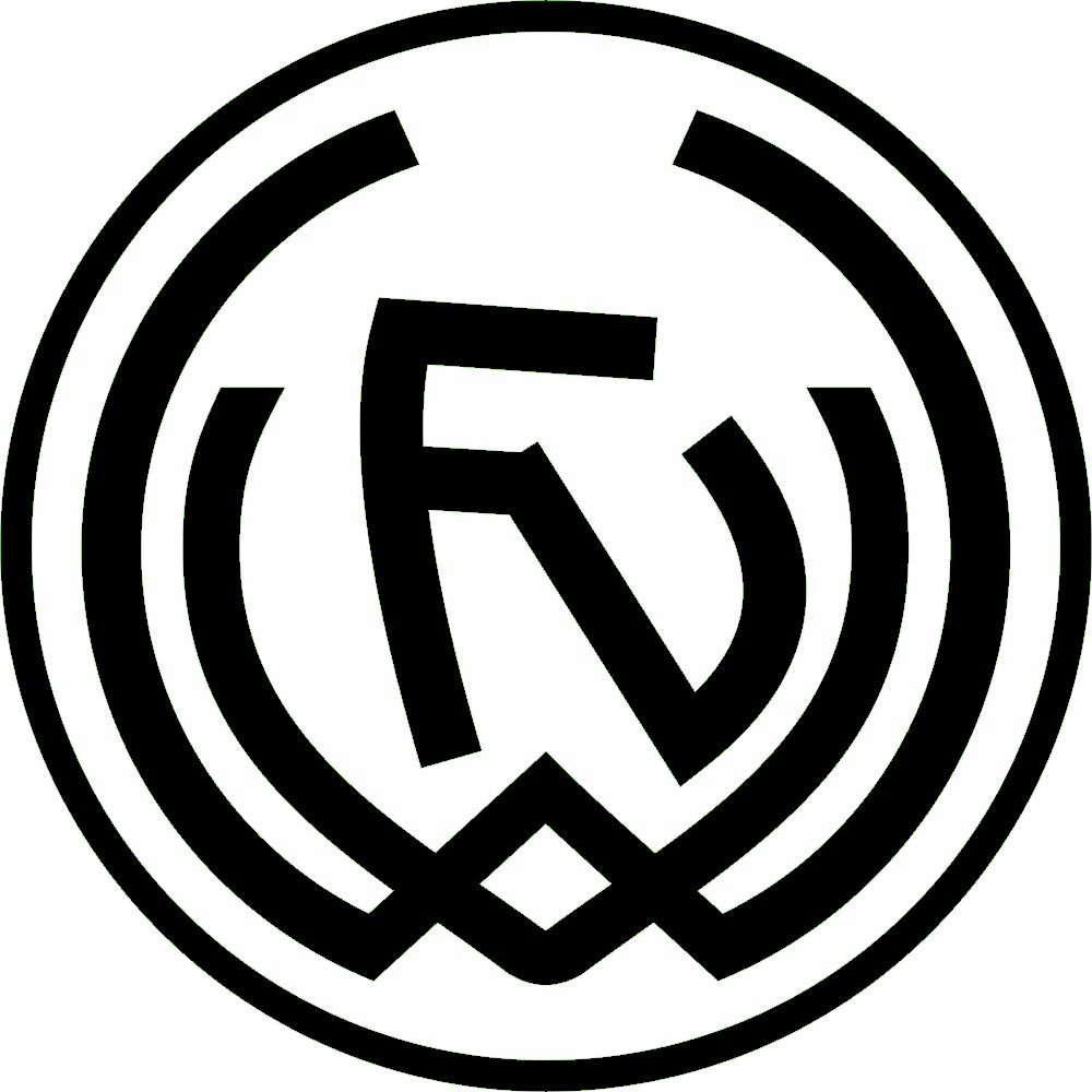 Vereinslogo des FV 1912 in der ersten Hälfte des 20. Jahrhunderts